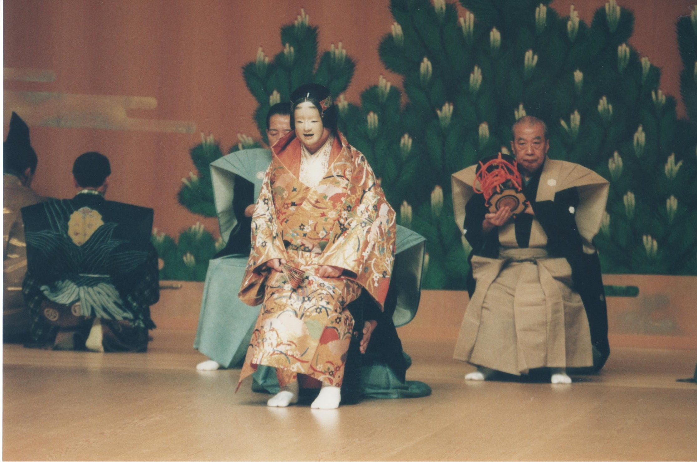 第13回涛華能H13.11.3草紙洗蘭拍子 小鼓 福井四郎兵衛